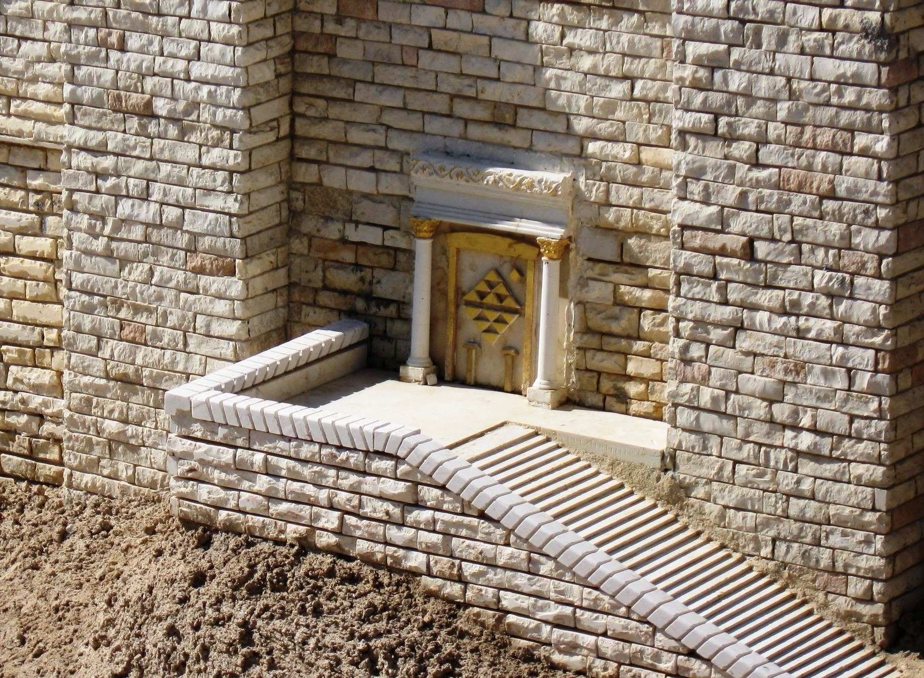 דגם ירושלים בסוף ימי בית שני